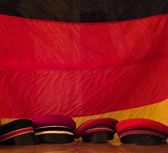 Mützen der KRB Mitgliedsbünde